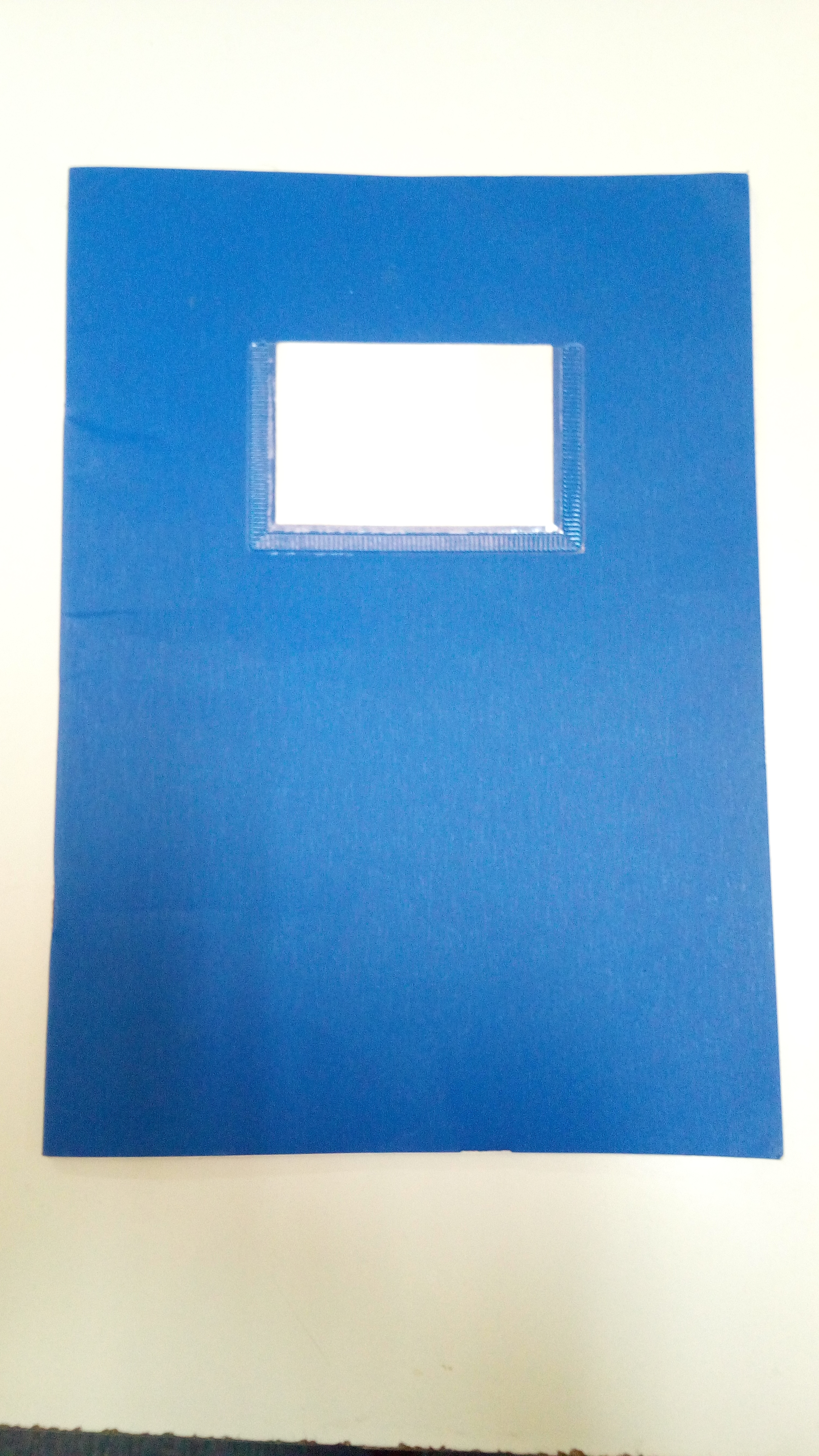 κλασικό μπλε τετράδιο